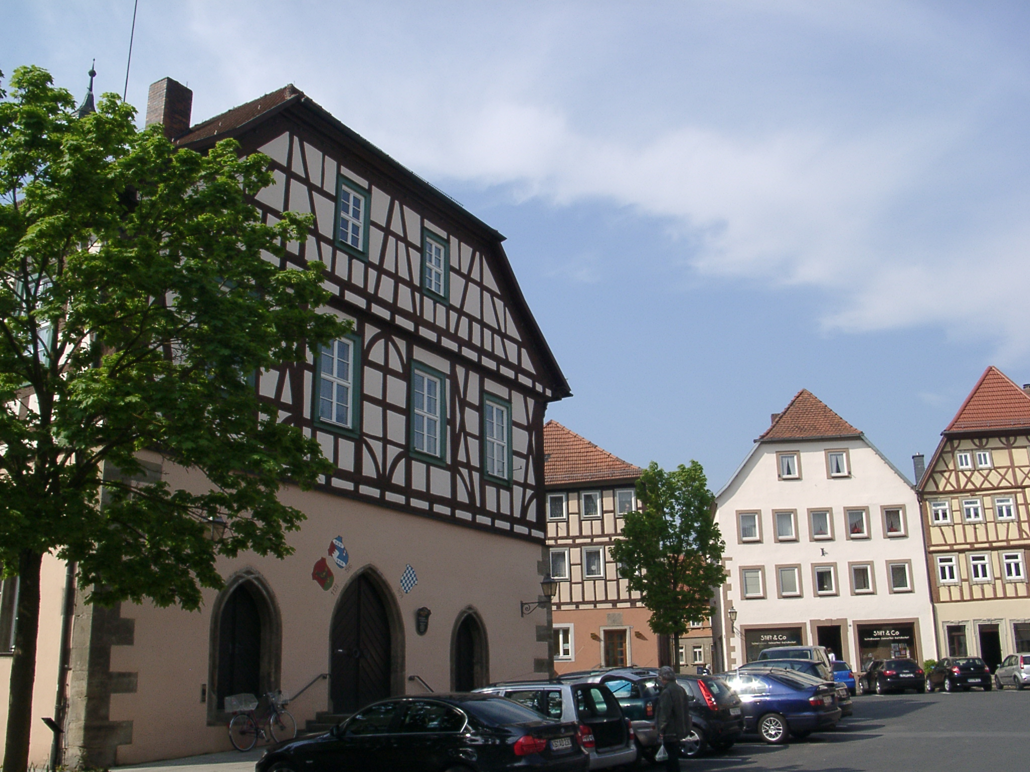 Münnerstadt, Rathaus